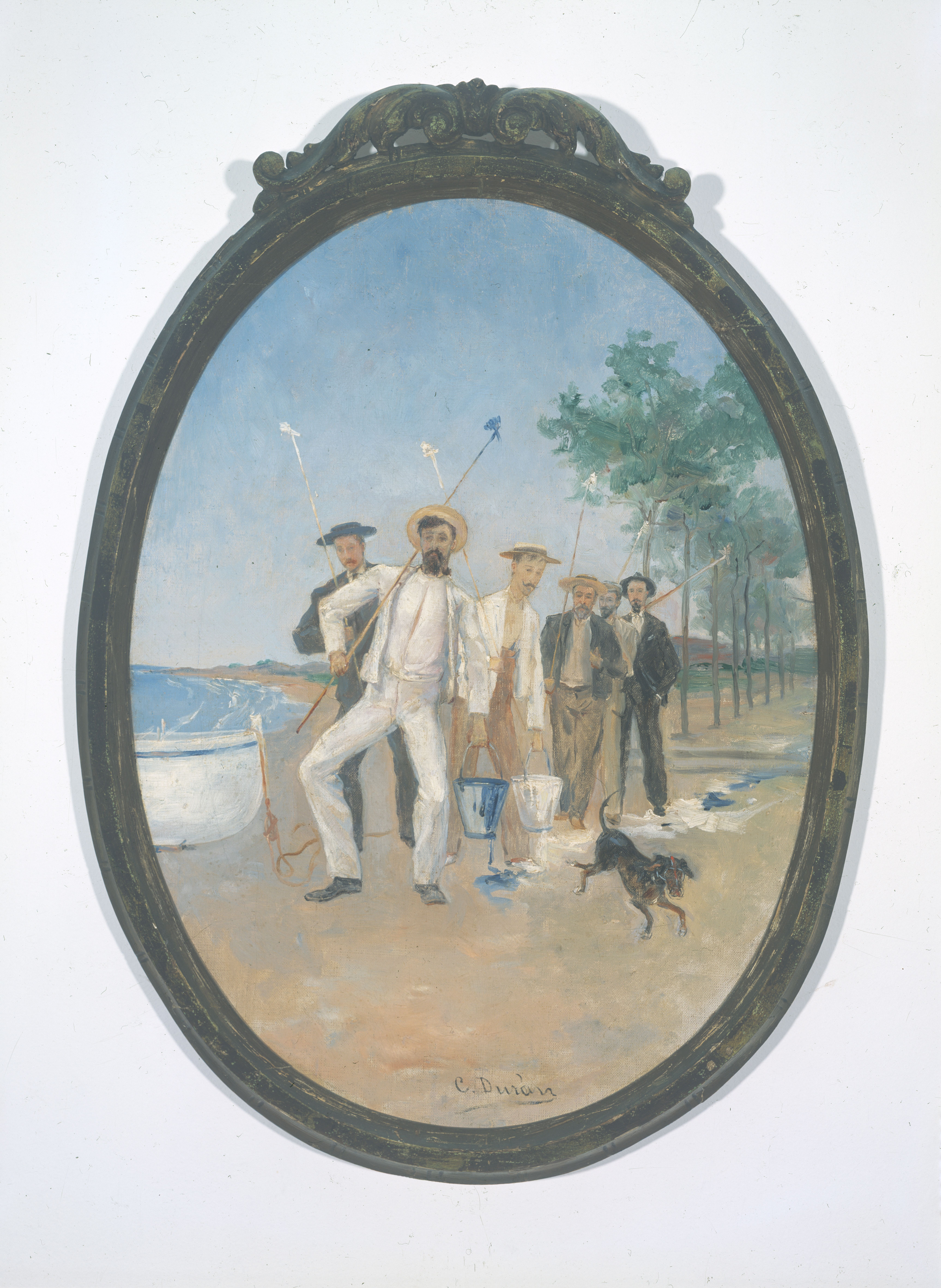 Càndid Durán Els pintamones 1895 Oli sobre tela